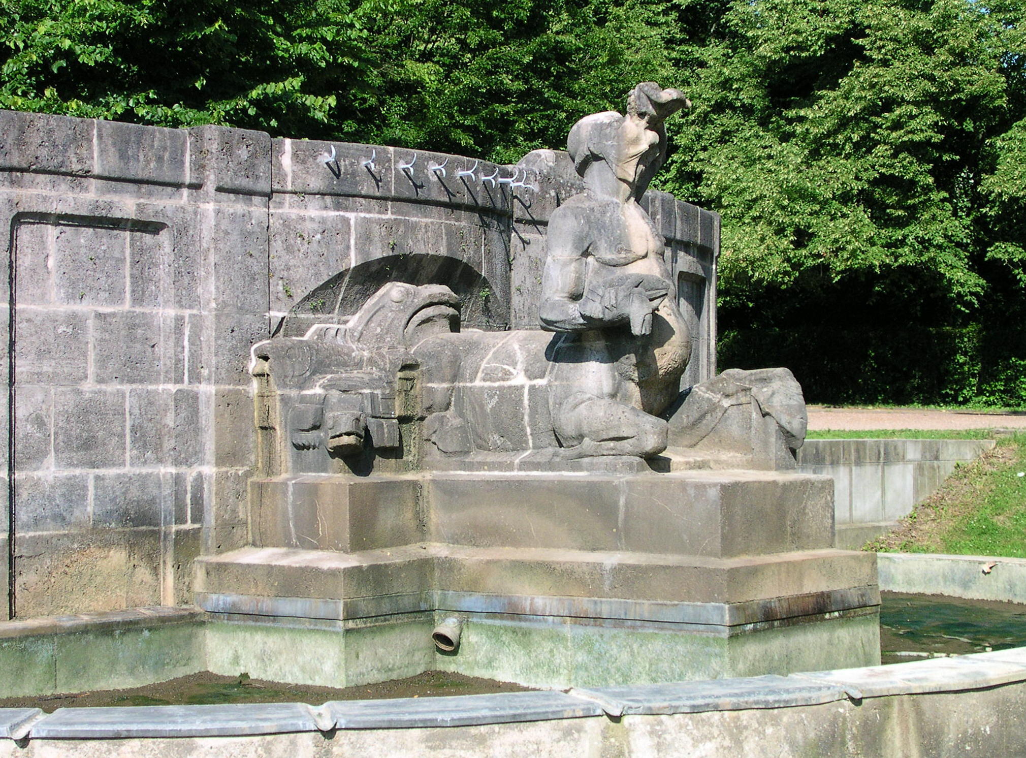 Tritonenbrunnen von Carl Burger, 1905 vor dem Aachener Hauptbahnhof aufgestellt, aber 1923 zur Kaiser-Friedrich-Allee versetzt